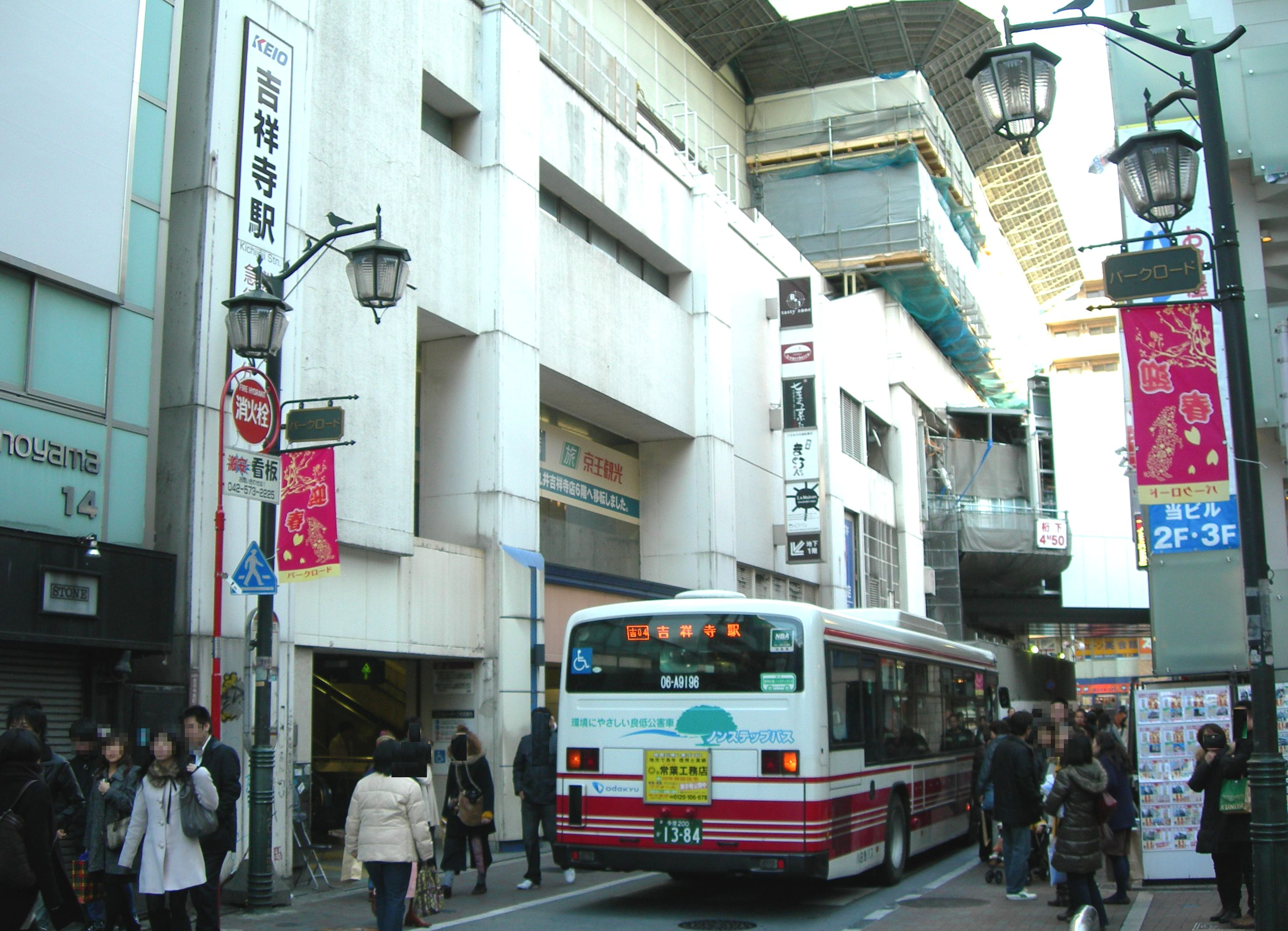 吉祥寺駅公園口（南口）